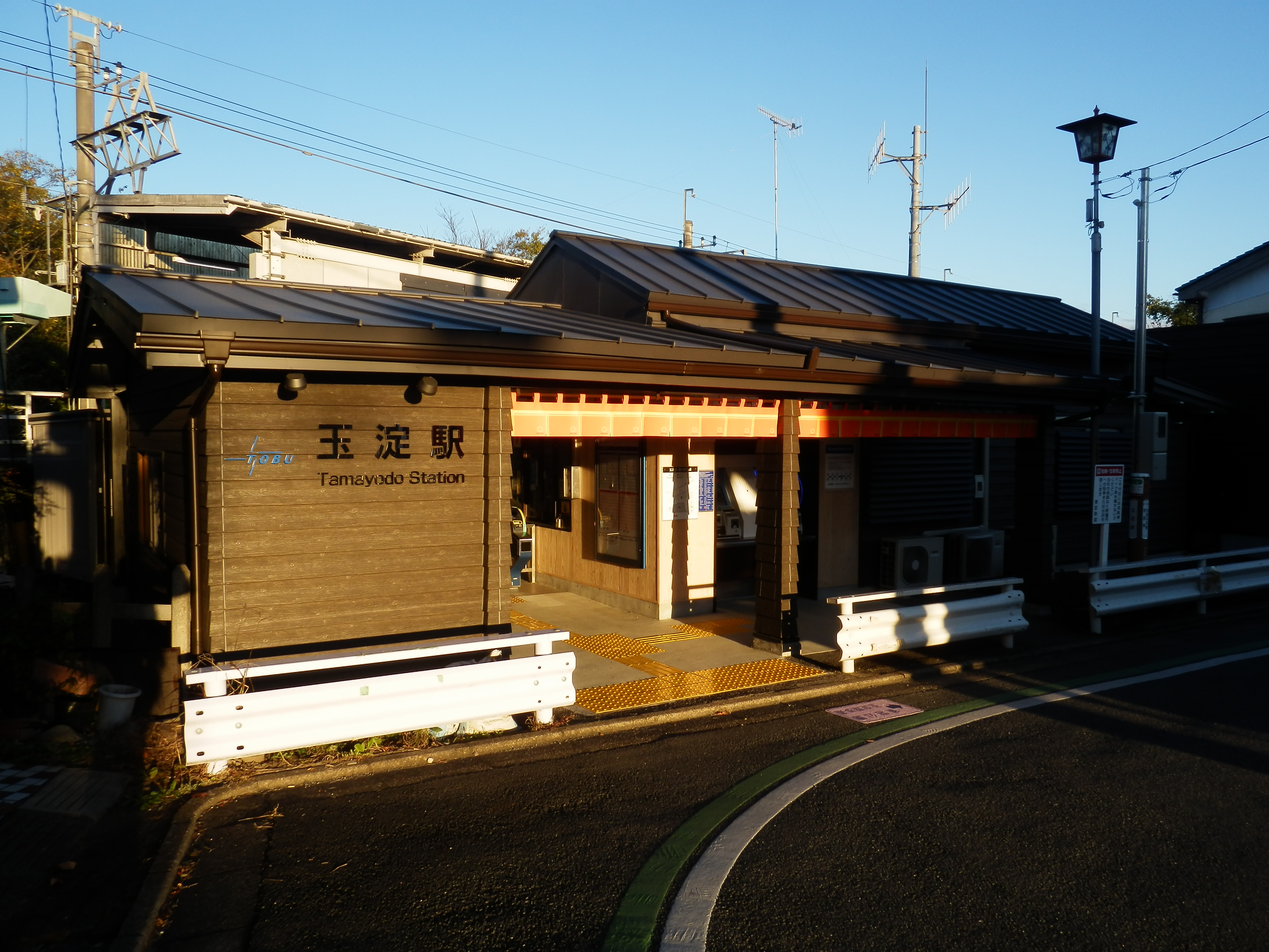 玉淀駅 駅舎